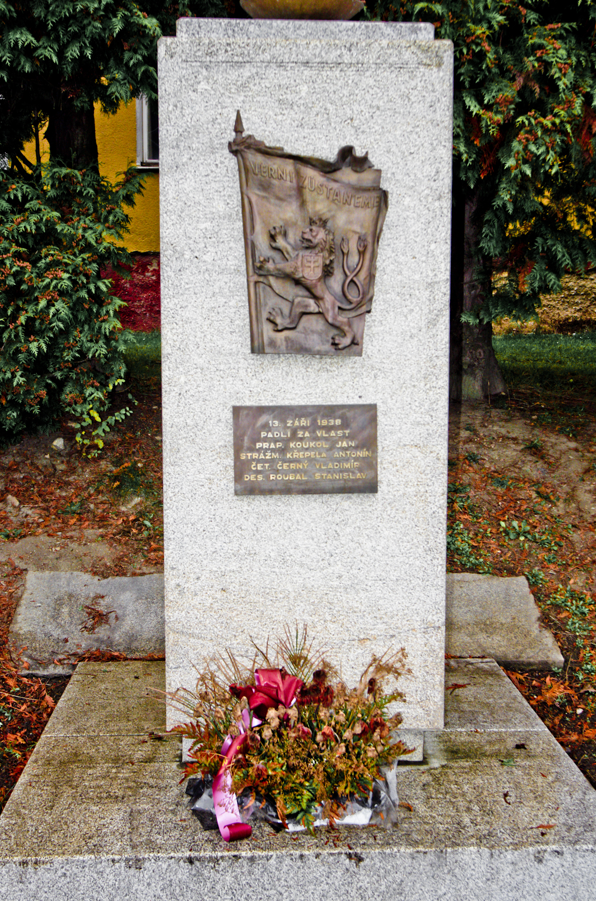 Pomník zastřelených četníků (Habartov), Habartov